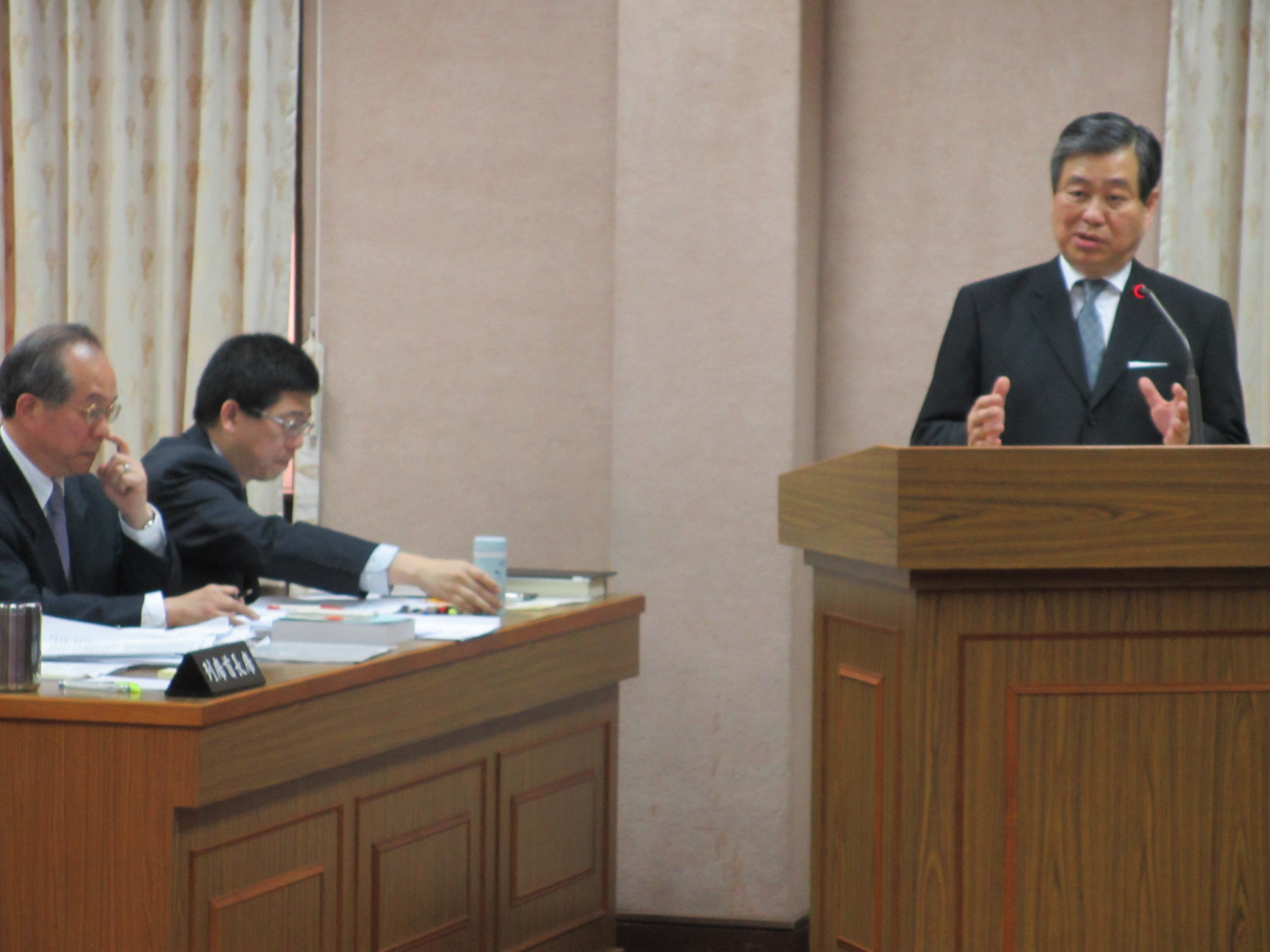 中華民國外交部次長石定在立法院外交及國防委員會接受質詢。